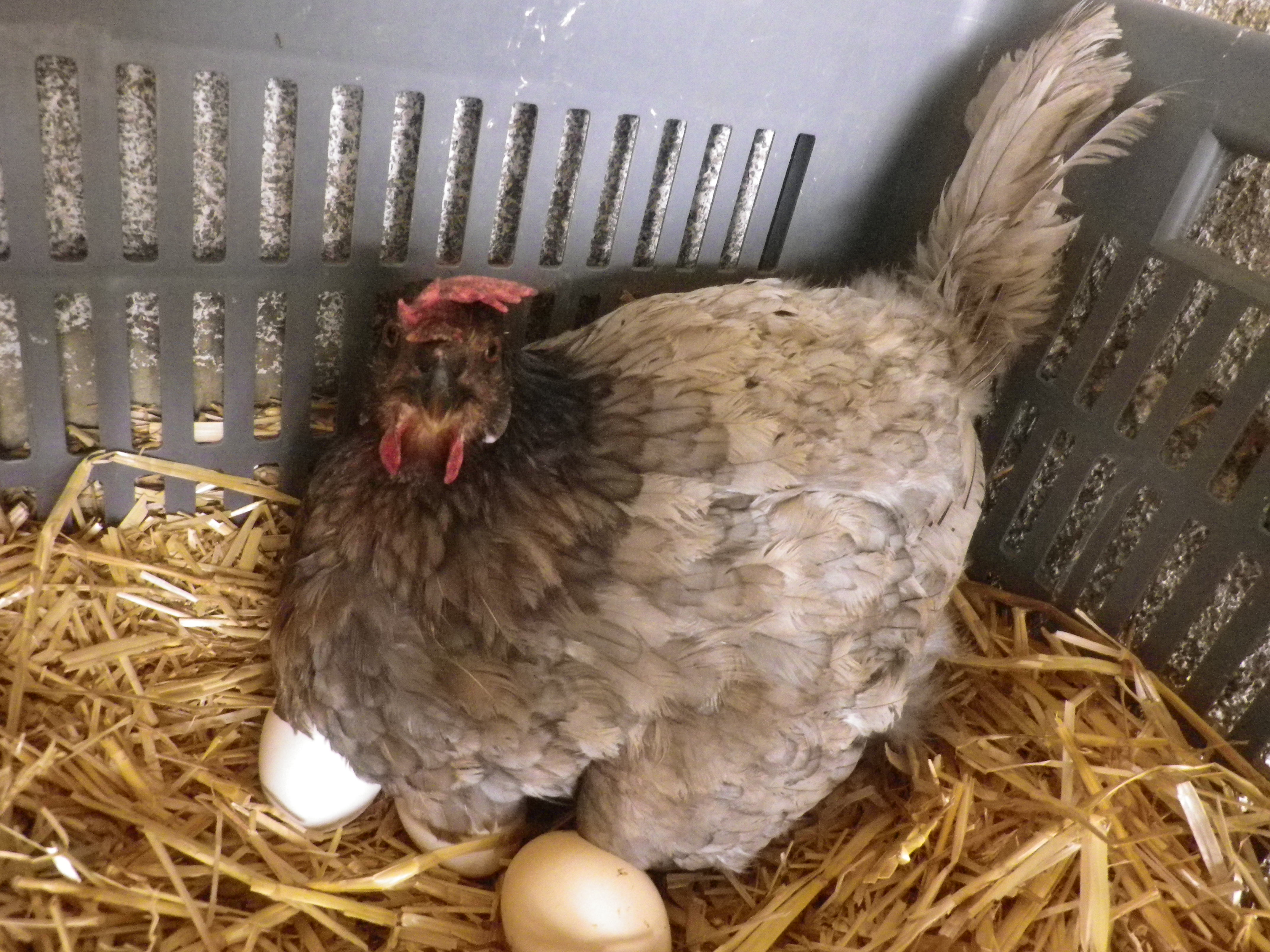 Poule B.D.F.